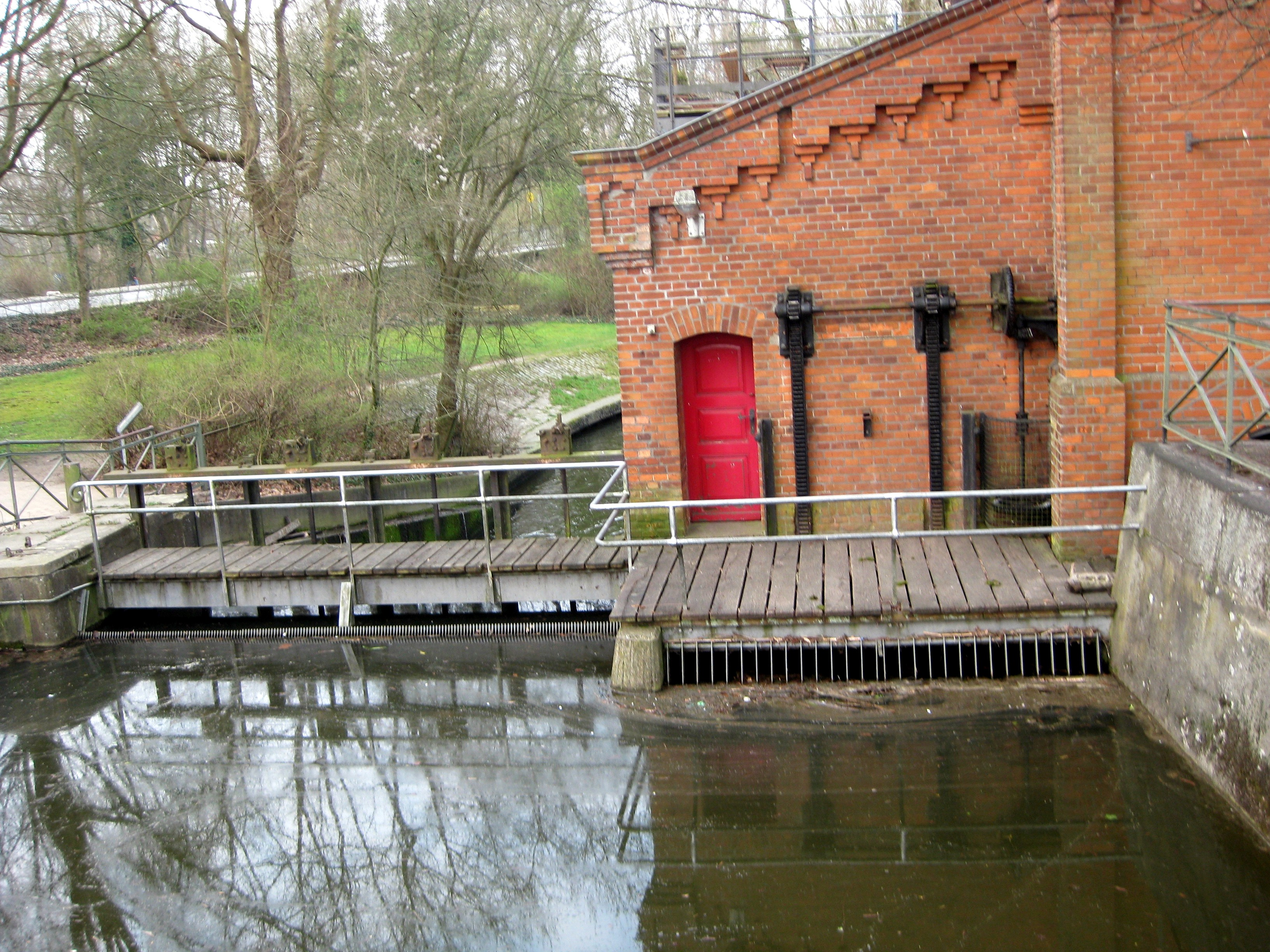 Wehr der äußeren Wassermühle am Lübecker Mühlenteich mit dem Abfluss der Wakenitz in die Trave. Das Mühlengebäude aus dem 19. Jahrhundert wird heute als Wohn- und Geschäftshaus genutzt.